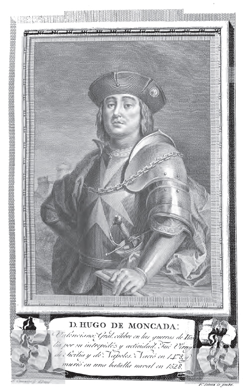 Retrato de Hugo de Moncada.